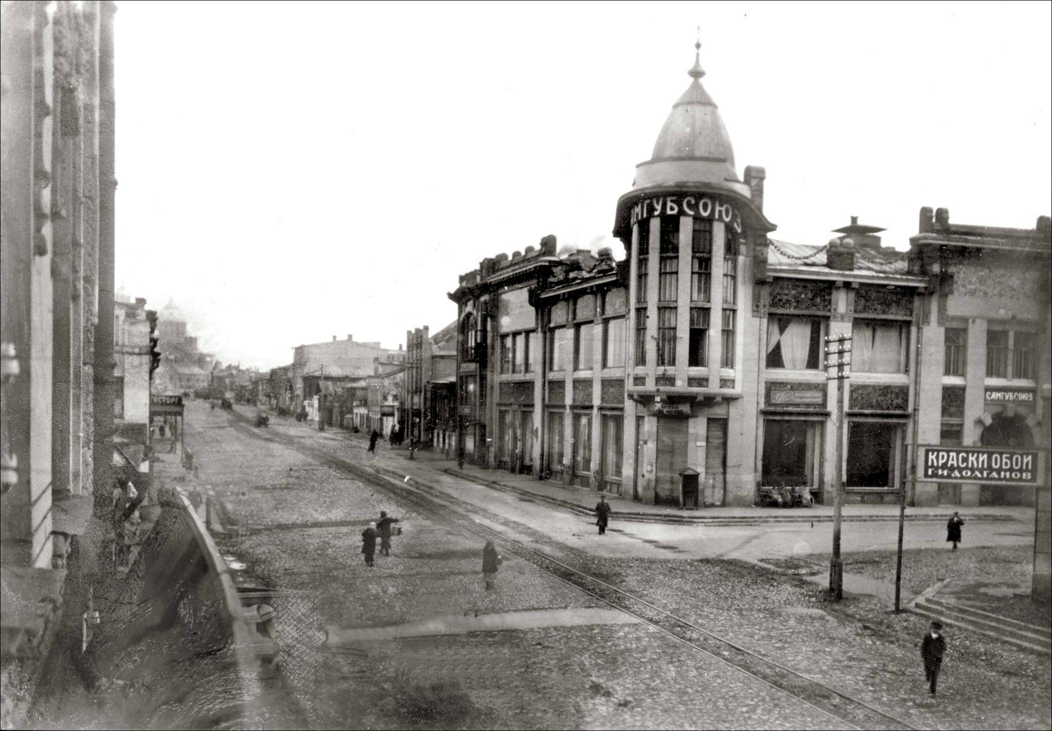 Бывший Торговый дом Щетинкина